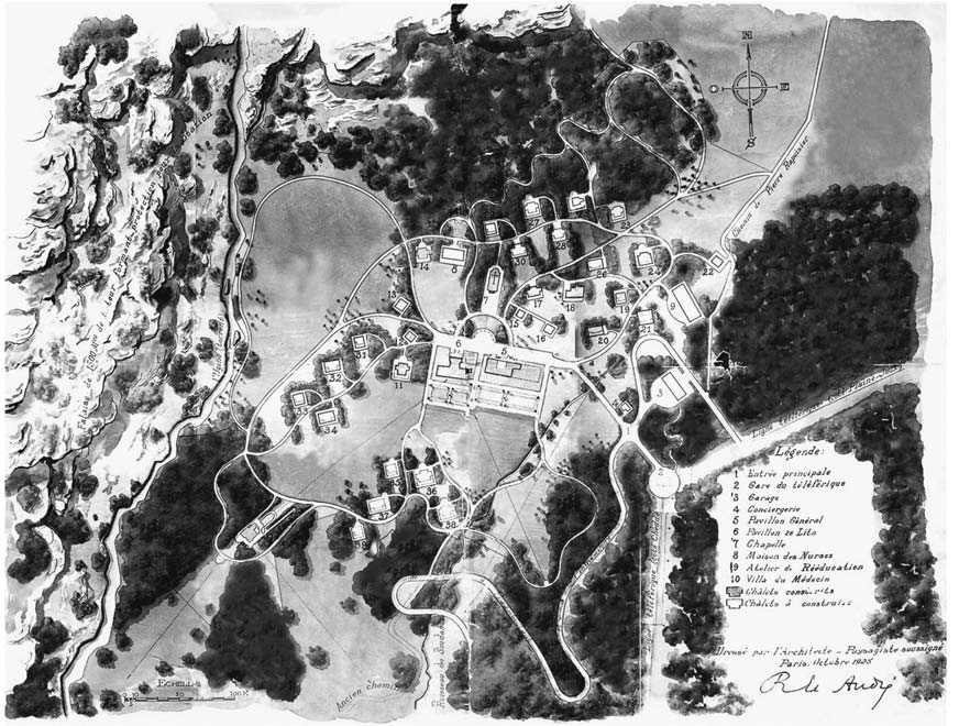 Dessin aquarellé de l’architecte paysagiste René Édouard André, 1925 (archives Praz-Coutant).